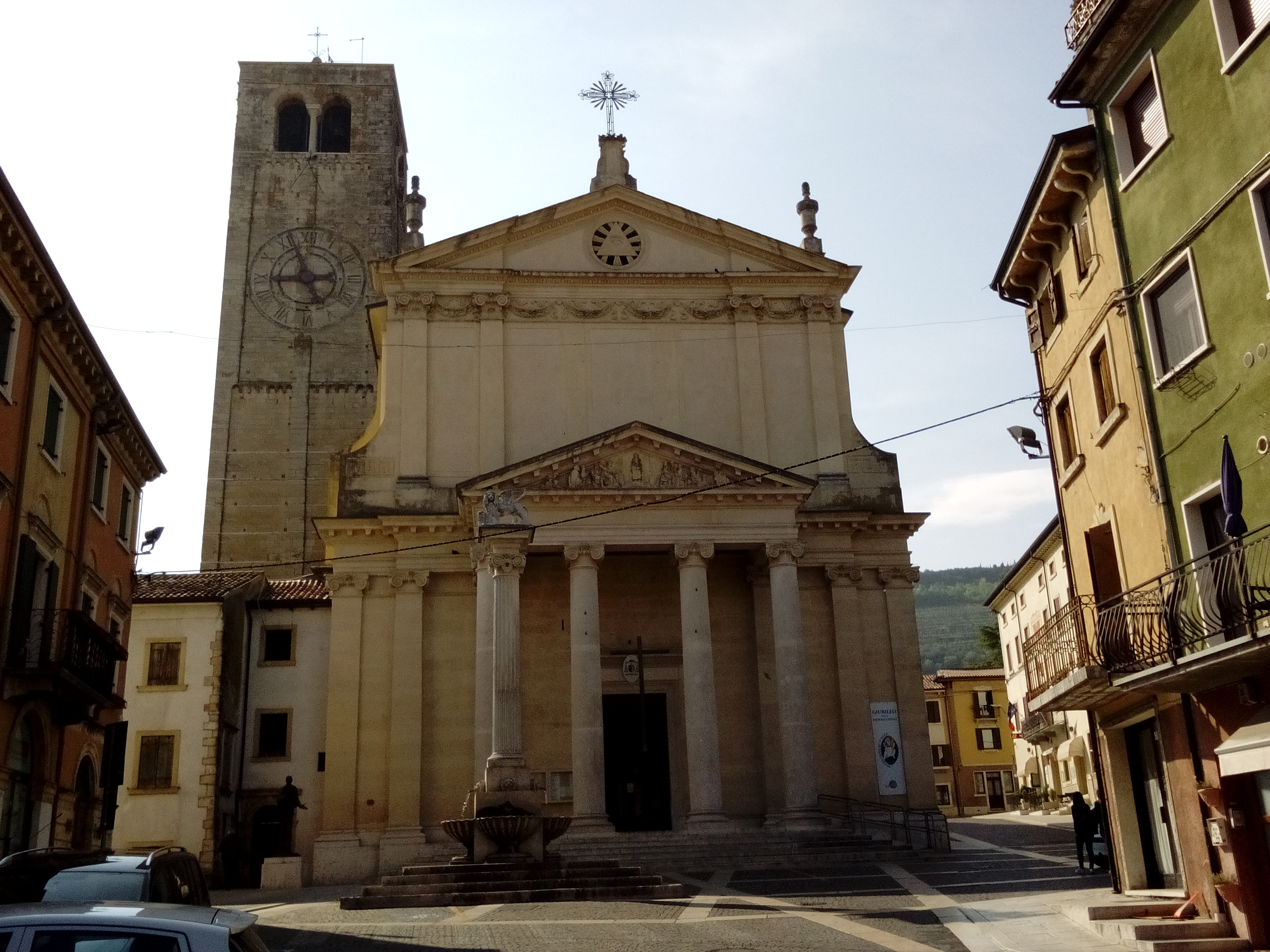 Facciata della chiesa Parrocchiale di Negrar, provincia di Verona. Fu costruita nel 1807 su di un precedente risalente fin d circa l'XI secolo.